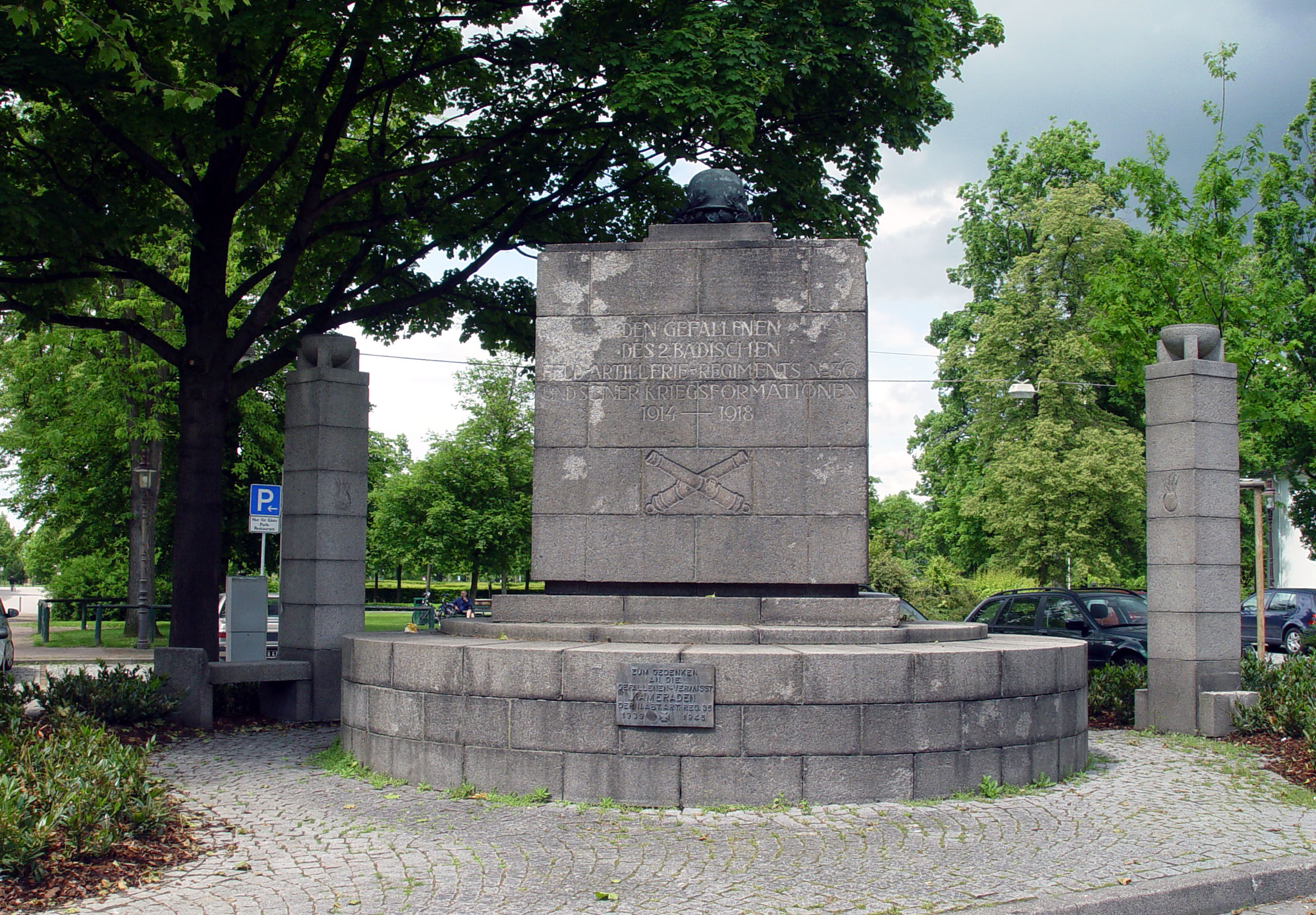 Fotografiert von Martin Dürrschnabel.